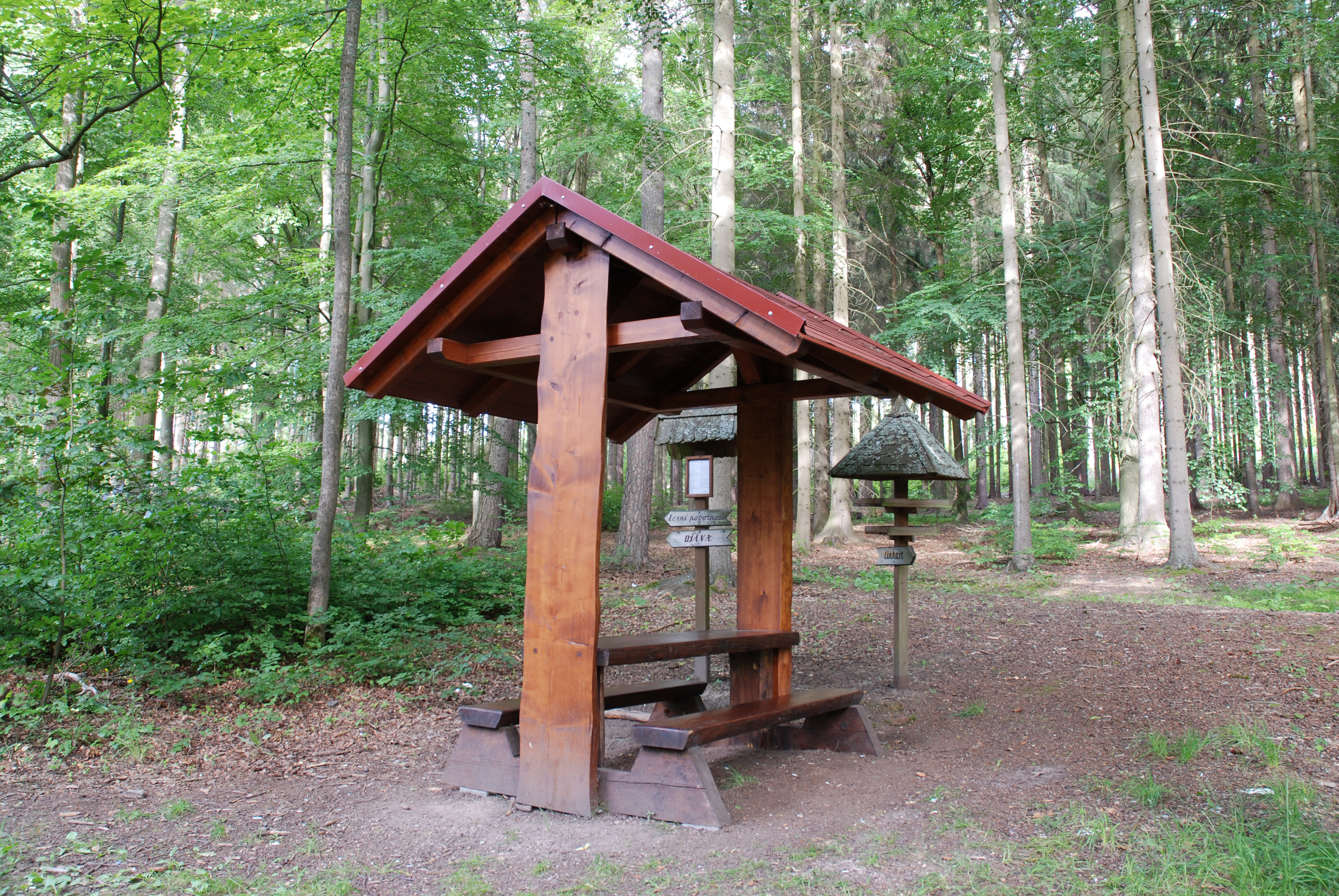 Přístřešek u krmítka drobného ptactva v karlovarských lázeňských lesích u Sovovy stezky